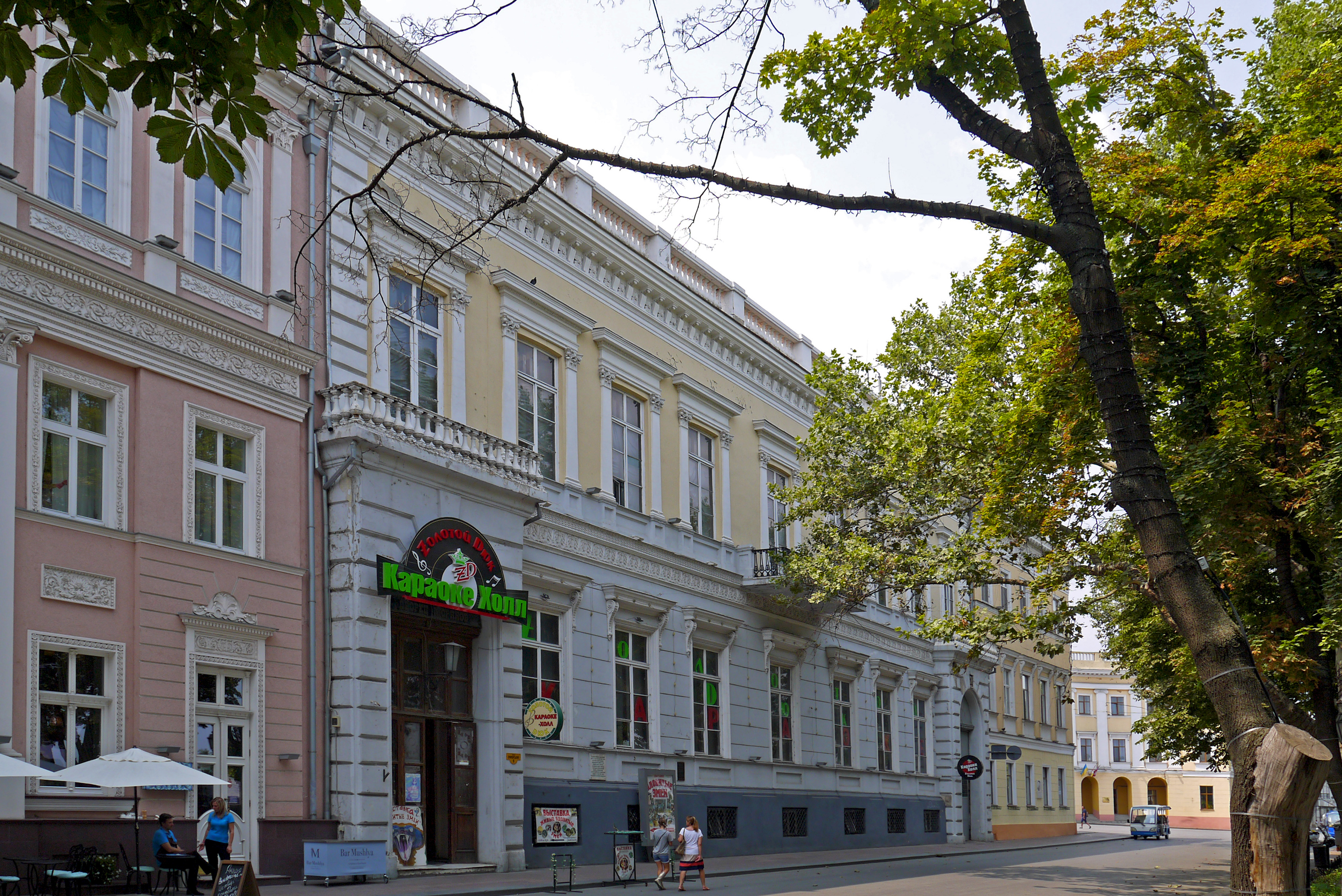 Палац Шидловського, де у кінці 1917 року — на початку 1918 року розміщувався центральний виконавчий комітет Рад Румунського фронту, Чорноморського флоту і Одеського військового округу («Румчерод»); 28 червня 1936 року провів сеанс одночасної шахової гри на 30 дошках чемпіон світу з шахів Хосе Рауль Капабланка, Одеса, Приморський бул., 9